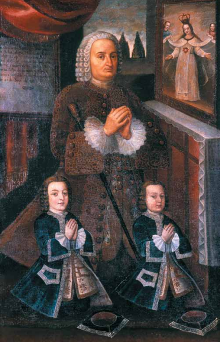 Retrato de Juan Pío de Montúfar y Frasso, primer marqués de Selva Alegre, en el que aparece junto a sus hijos mayores: Juan Pío y Pedro. Autor anónimo, siglo XVIII.